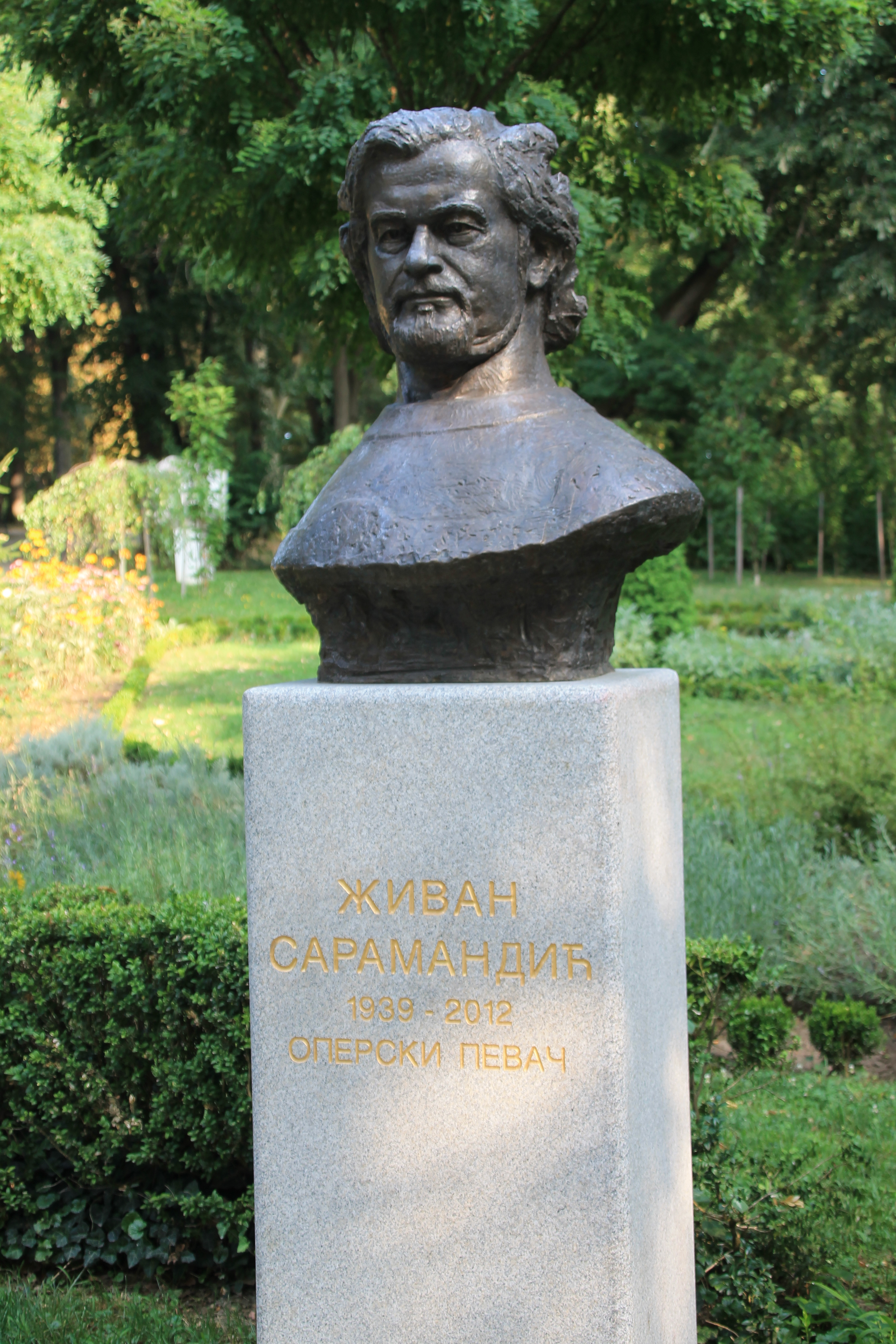 Bukovička banja